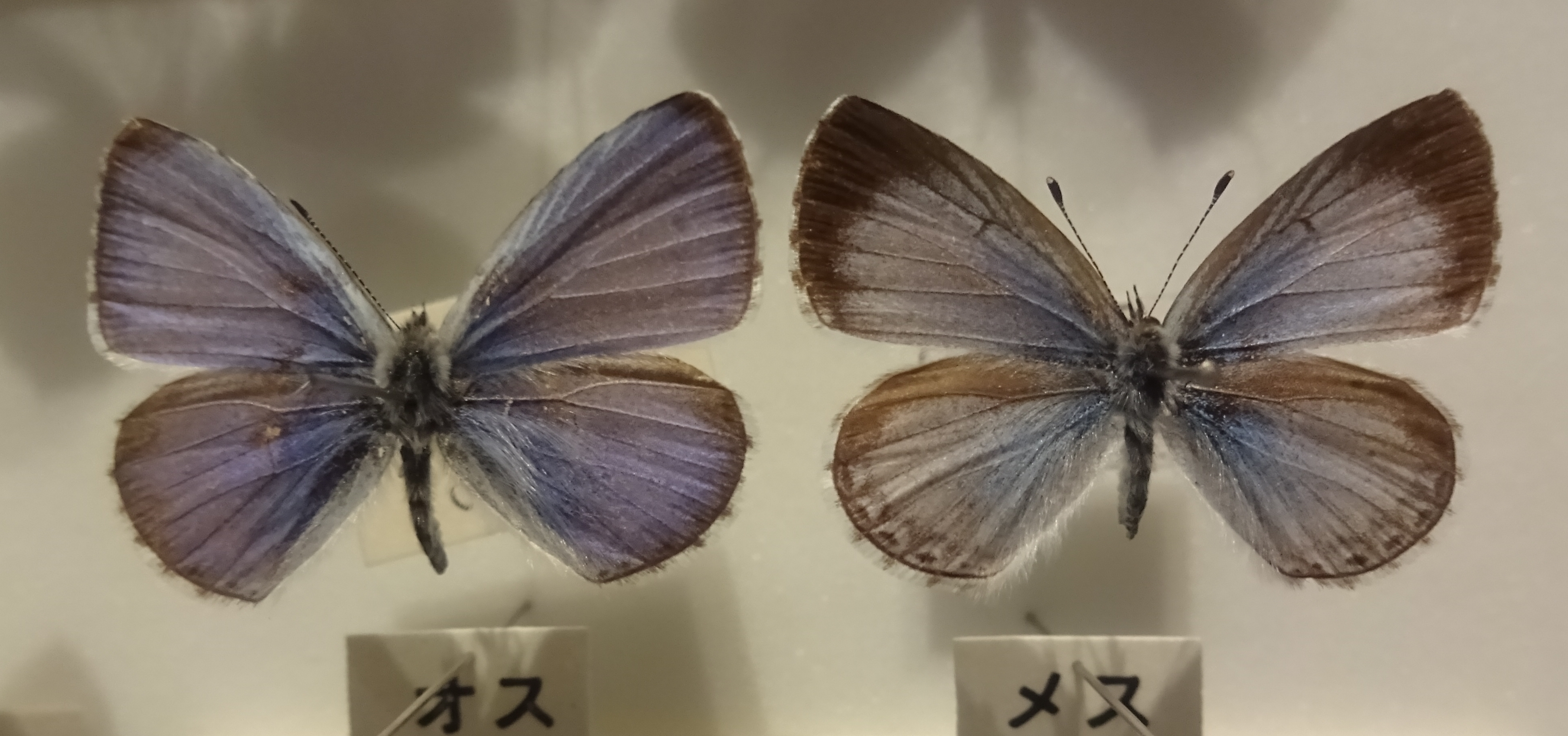 ルリシジミ-神奈川県立生命の星